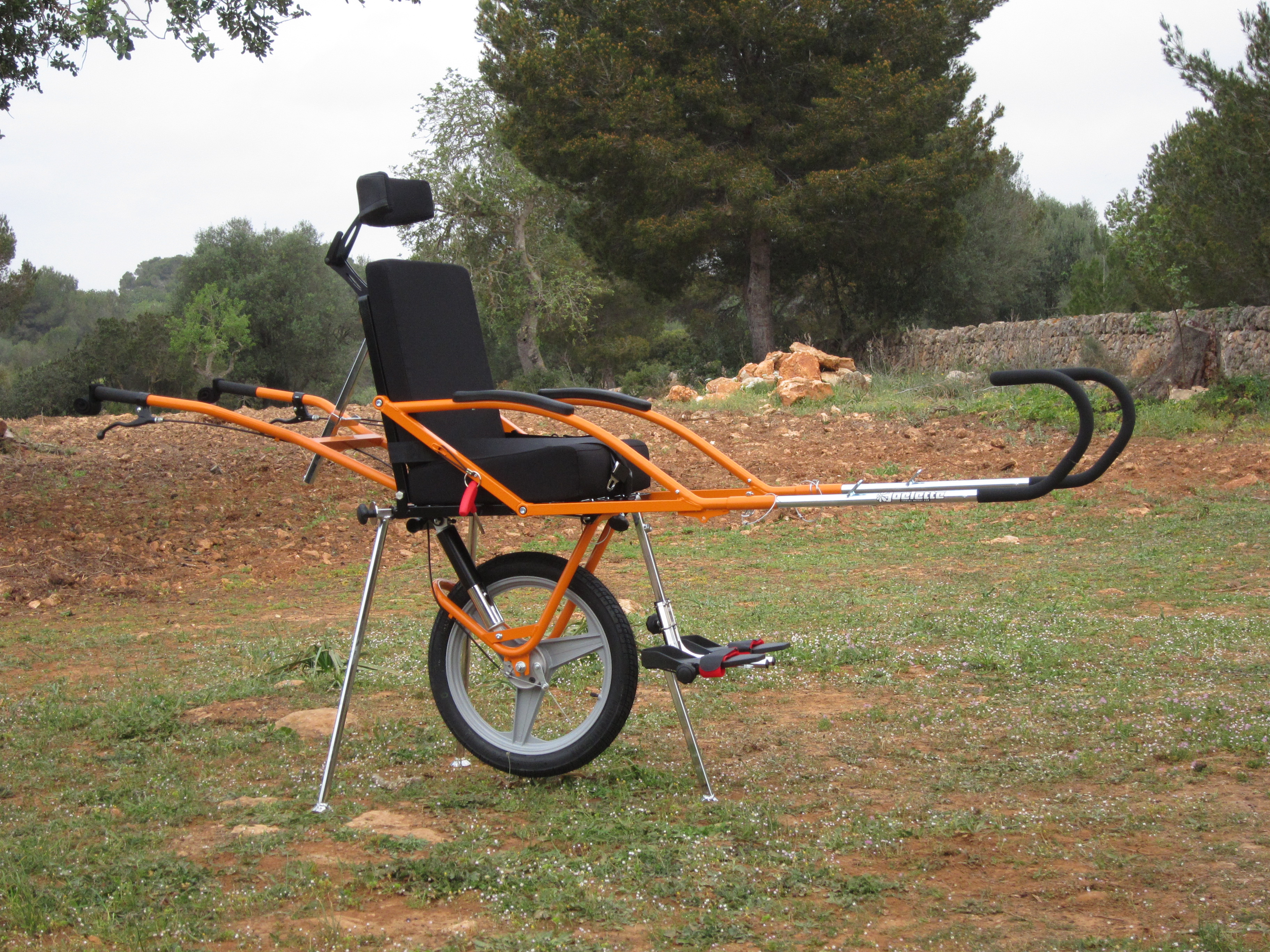 Silla de senderismo adaptado Joëlette